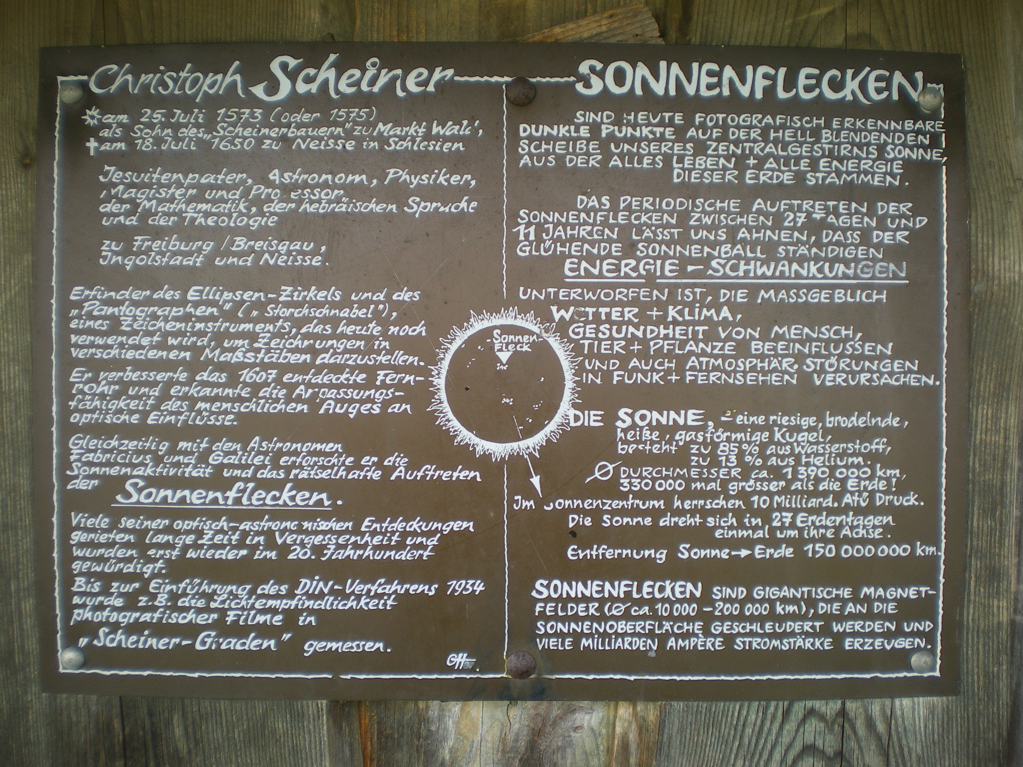 Hier sieht man eine Tafel mit Inforamtionen von Christoph Scheiner; diese befindet sich an dem Christoph-Scheiner-Turm.